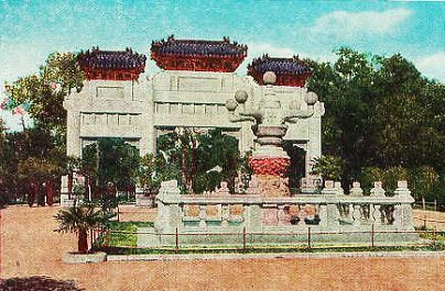 Axiom victory memorial arch of Peking（北京公理战胜牌坊）